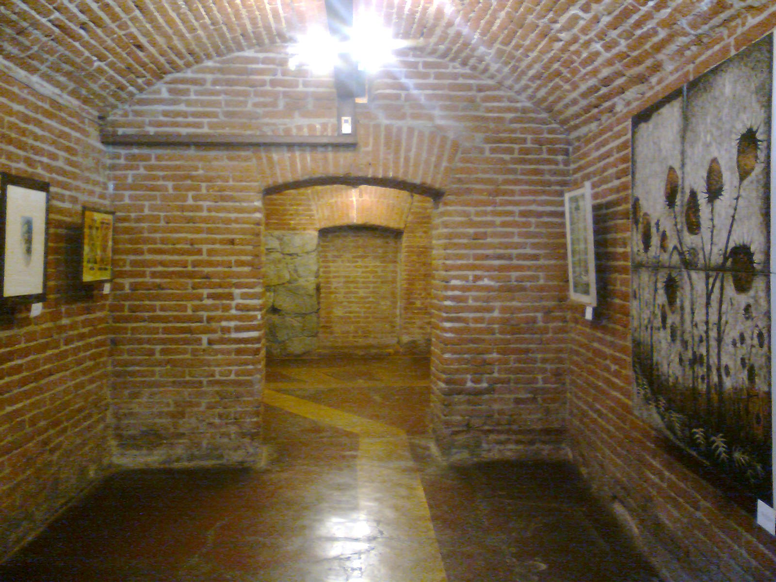 Subterráneo de museo de Historia Natural de Valparaíso